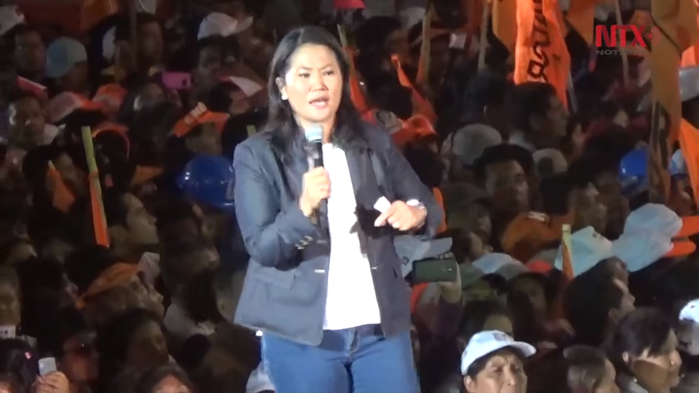 Keiko Fujimori no último ato de sua campanha presidencial em 2016.